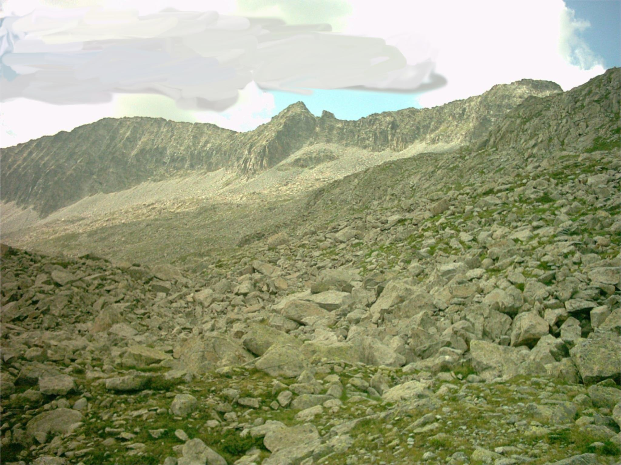 Monticellograd